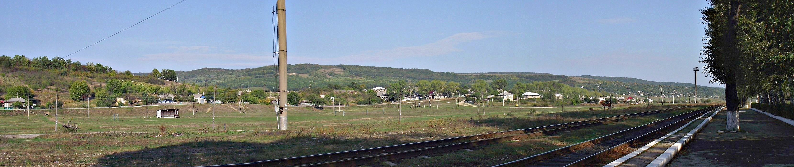 E58, Pojarna, Moldova